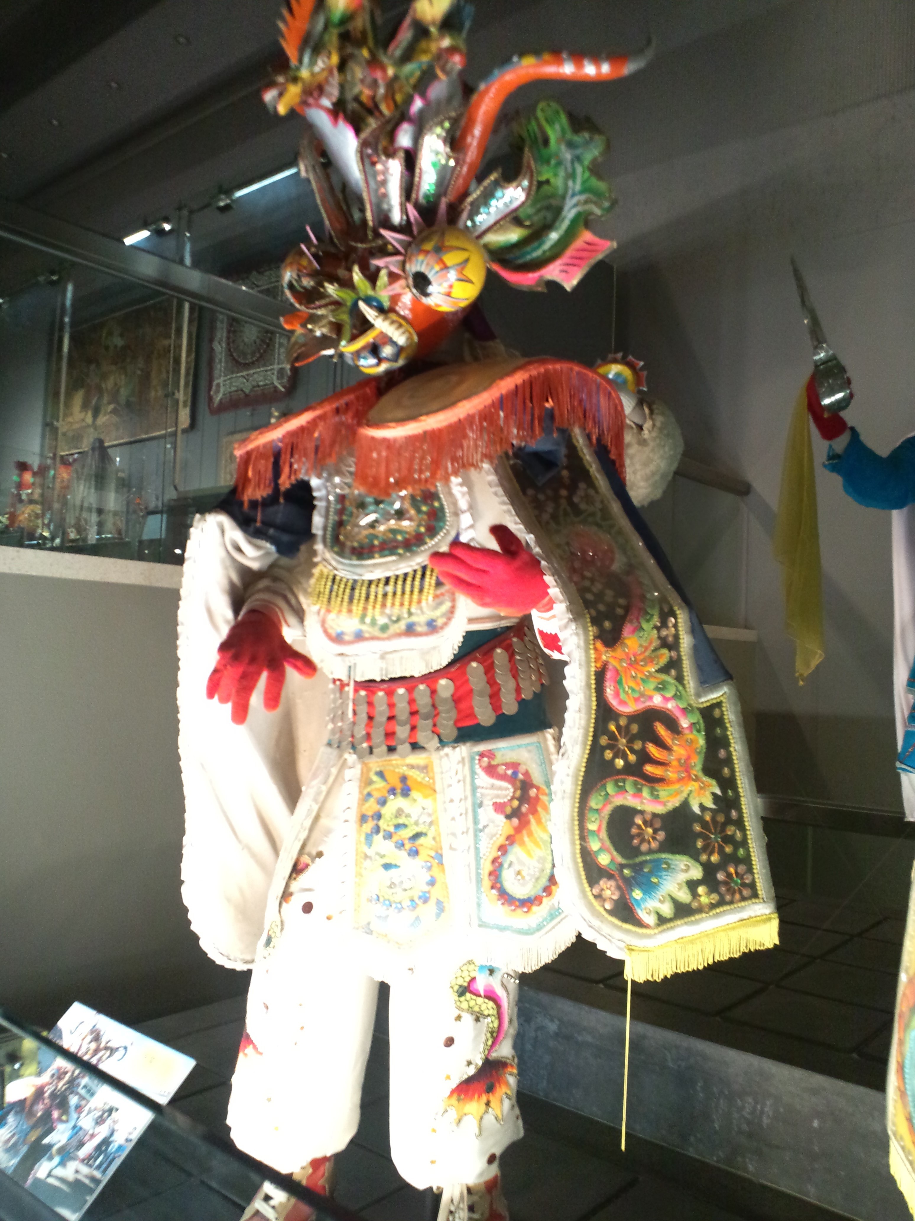 リトルワールド 本館展示室 ボリビアのディアブラーダ（オルロ市） 魔王